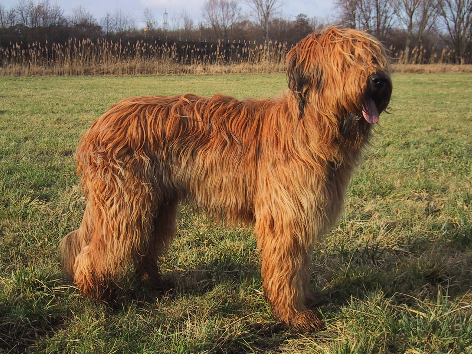 Briard in der Farbe fauve